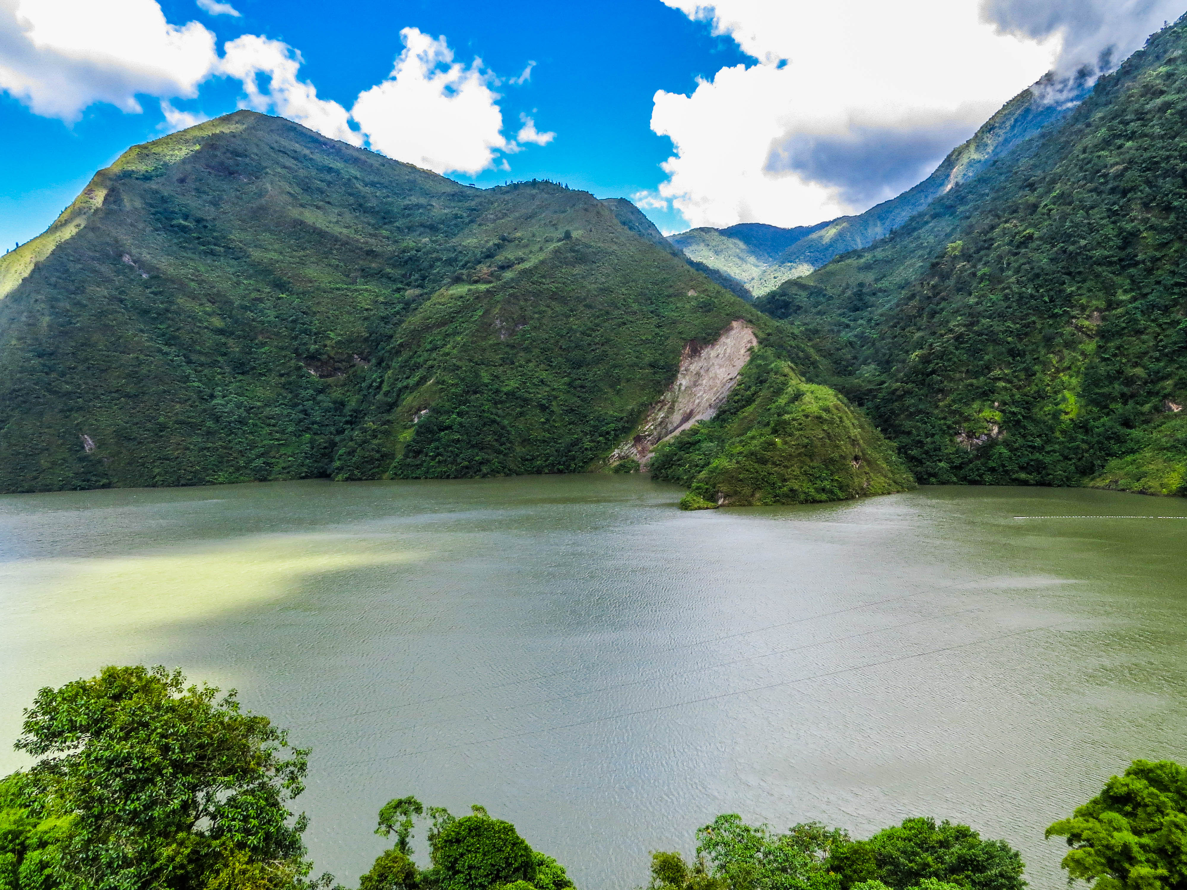 Es un lago artificial creado para proporcionar potencial hidráulico a la Central Hidroeléctrica de Chivor, ubicado en jurisdicción de los municipios de Macanal, Chivor y Almeida, en el departamento de Boyacá en la República de Colombia. Monumento de la ingeniería colombiana.